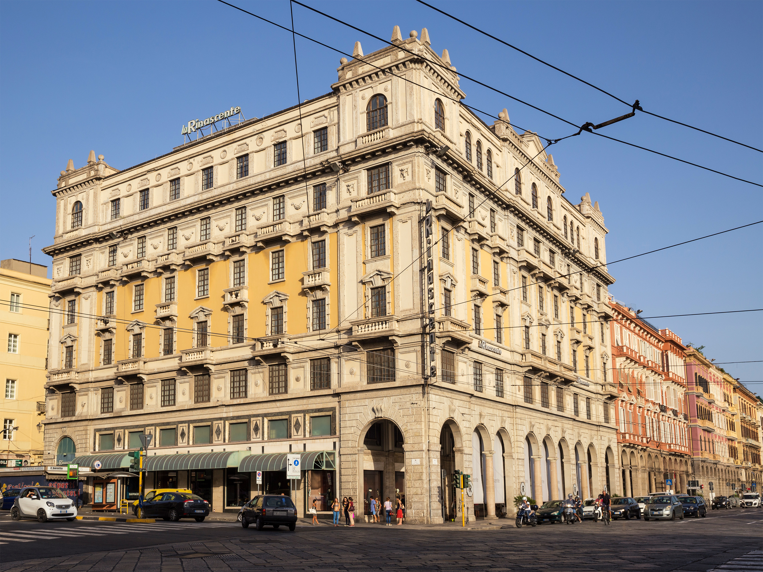 Cagliari, Via Roma, La Rinascente